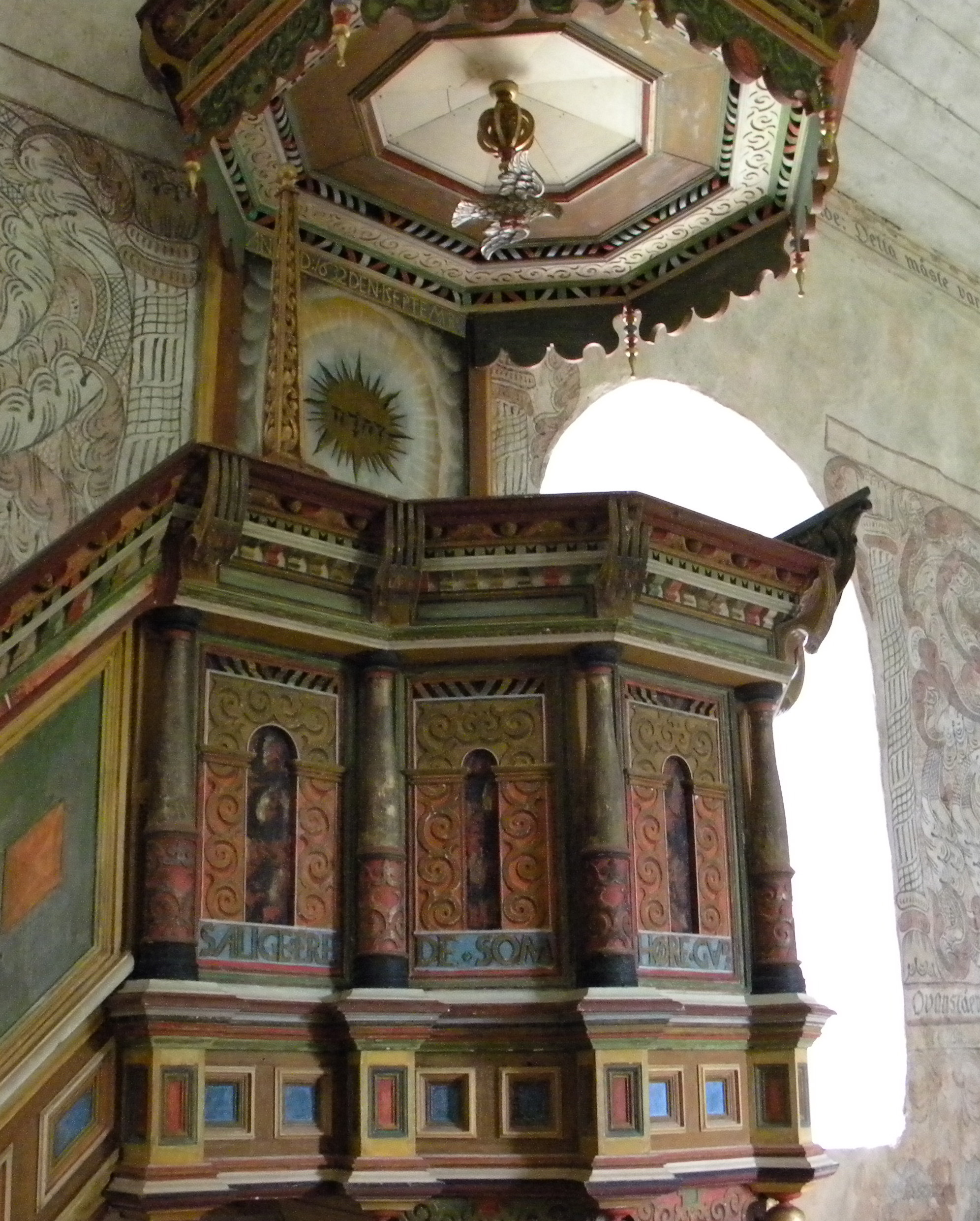 Predikstol med tetragrammet JHWH i solsymbolen i Ragunda gamla kyrka